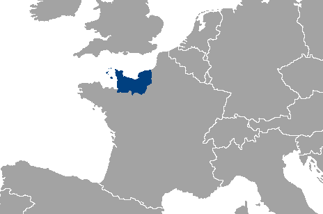 Normandía, territorio histórico.